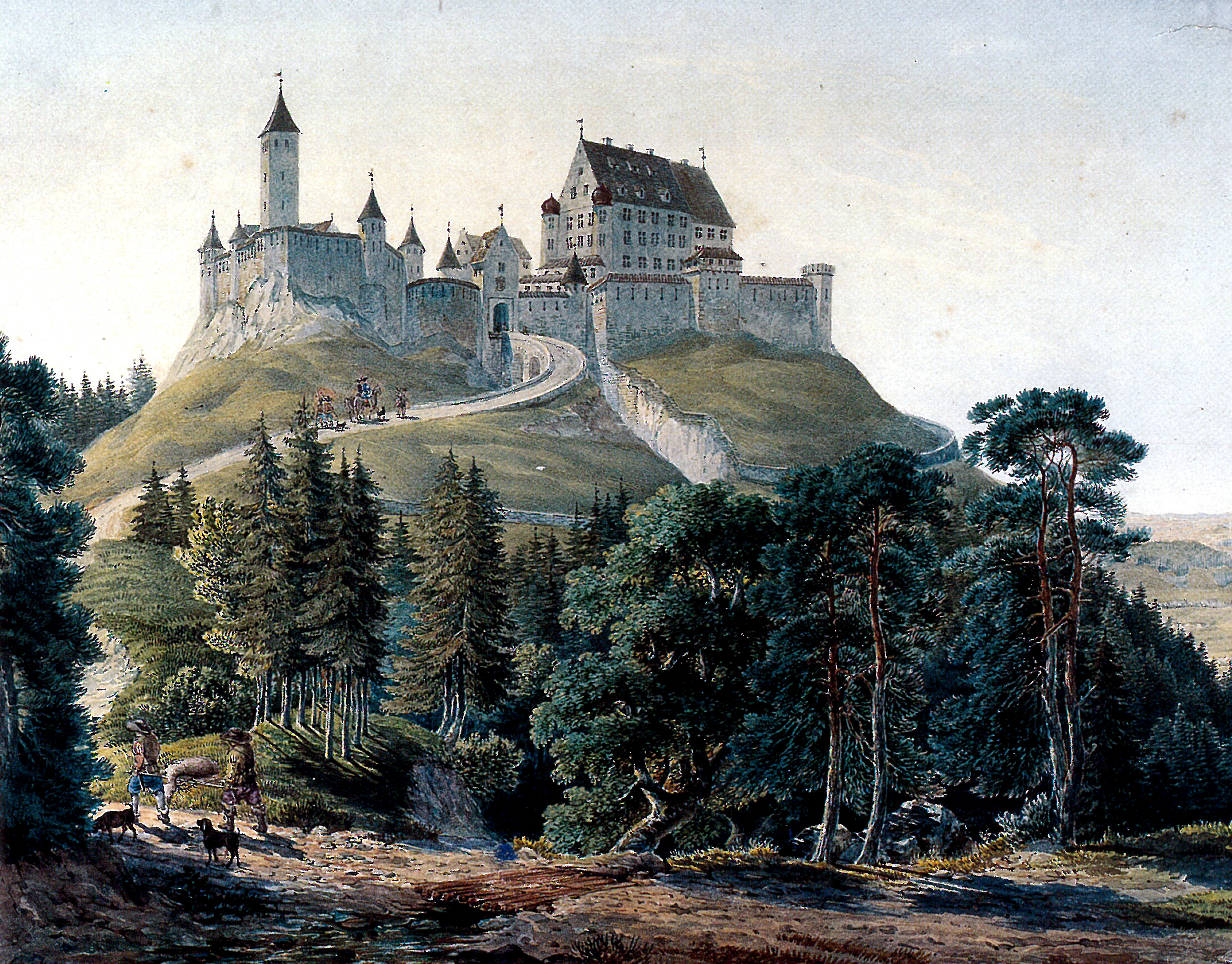 Burg Alt-Trauchburg, in: Album der Waldburgischen Schlösser, Gouache.